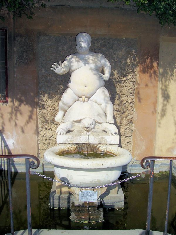 Giardino dei Boboli, Firenze, Italy.